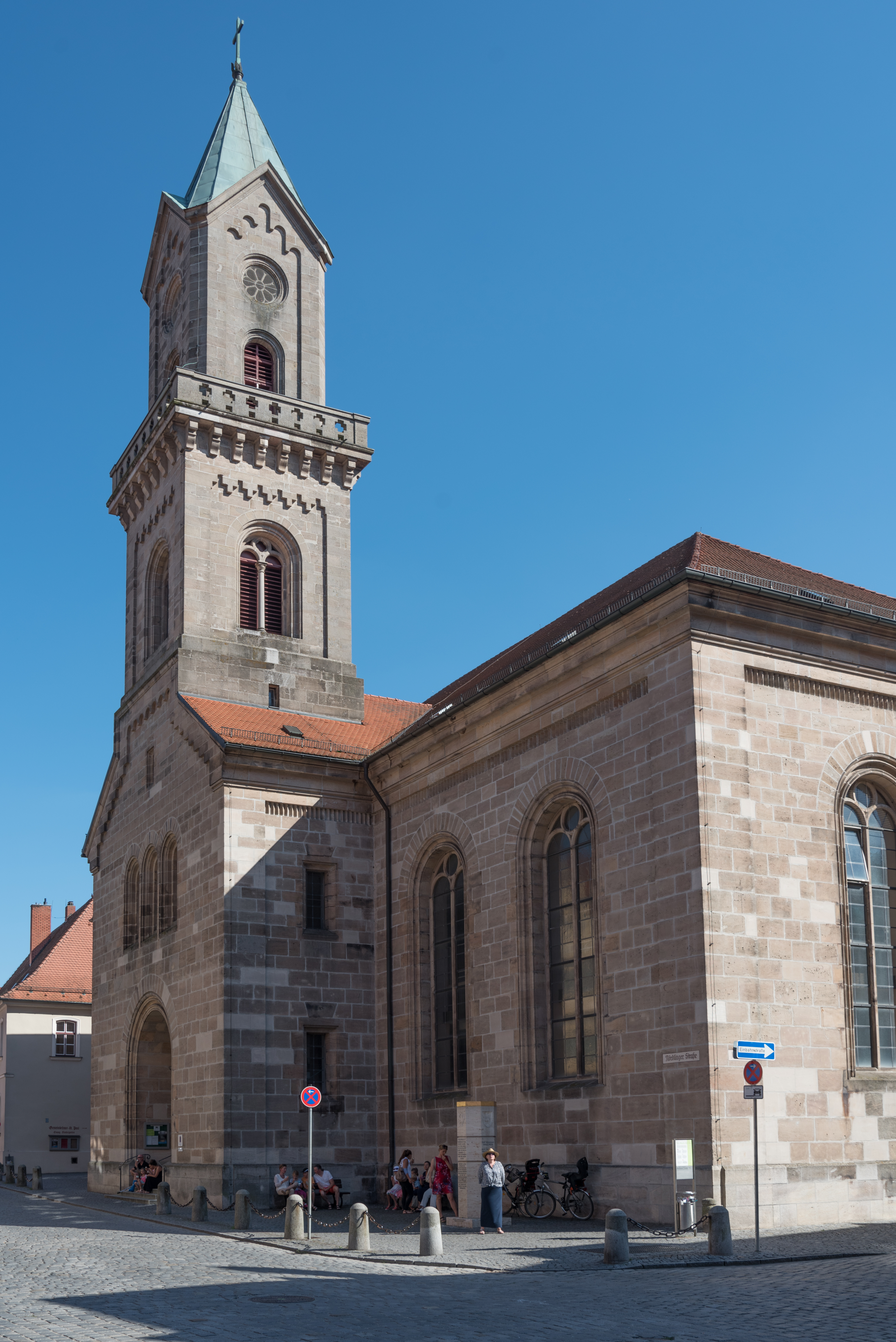 Dinkelsbühl, Evang.-Luth. Stadtpfarrkirche St. Paul